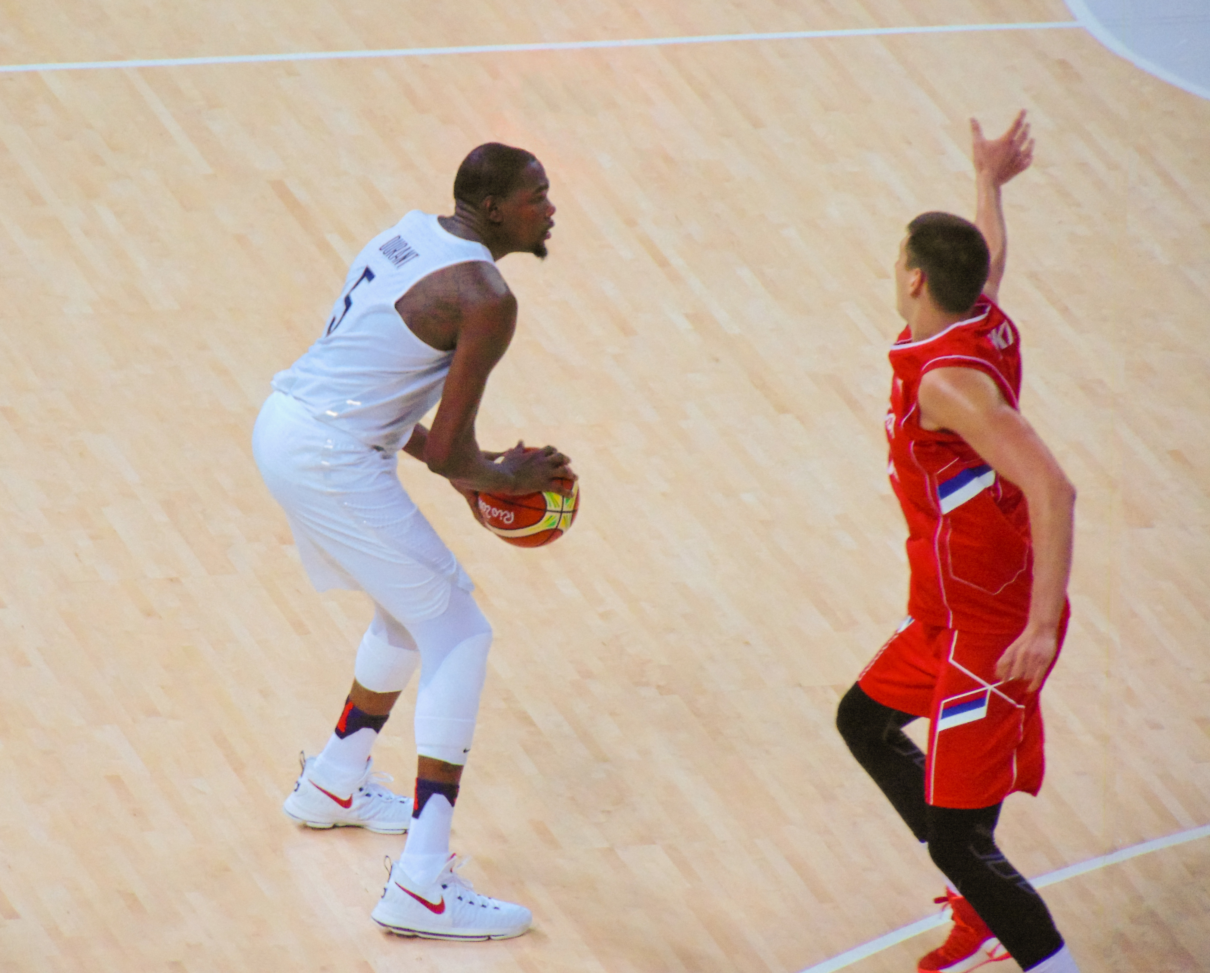 Rio 2016 - Men's basketball USA-SRB